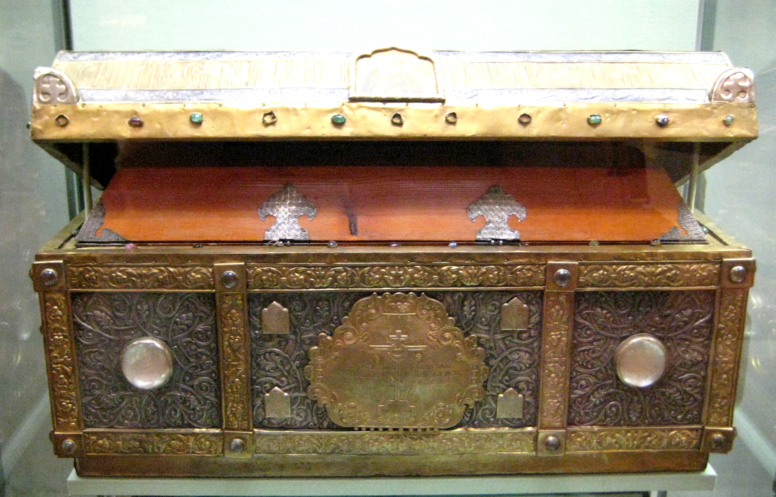 Реликварий для мощей патриарха Гермогена. Россия, 1913. Медь. Изготовлен по повелению Николая II. Послужил образцокм для раки, установленной в 1914 в Успенском соборе. ГИМ